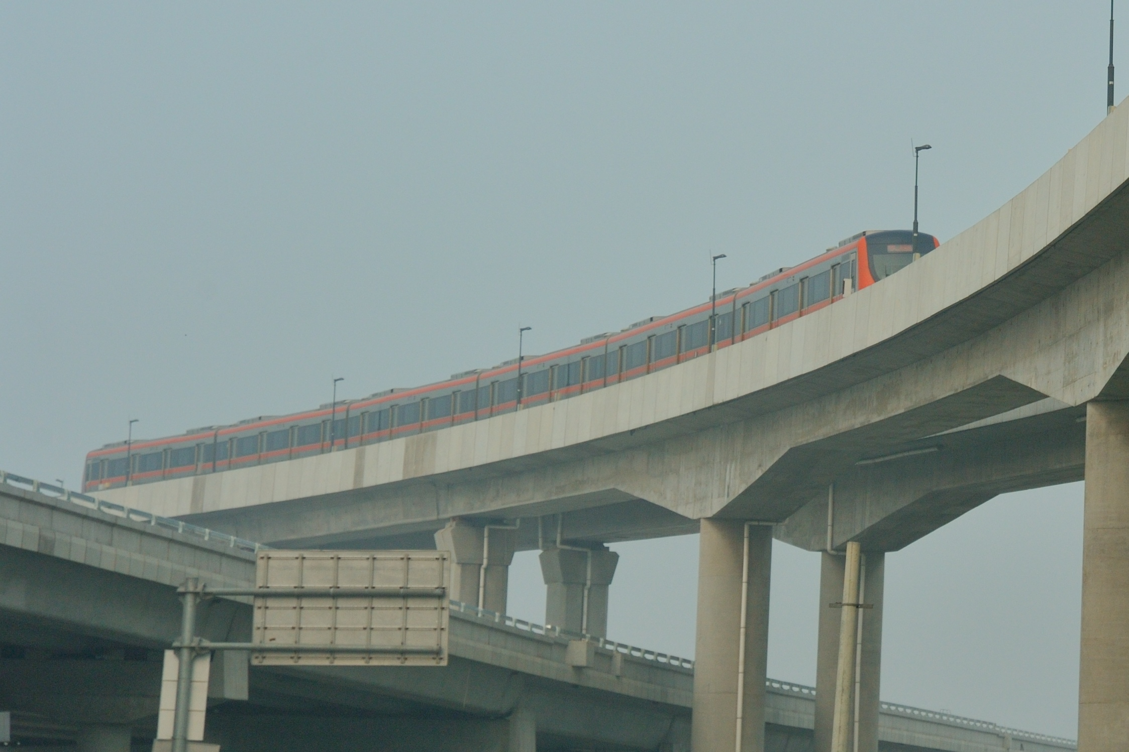 一列房山线列车进入长阳站